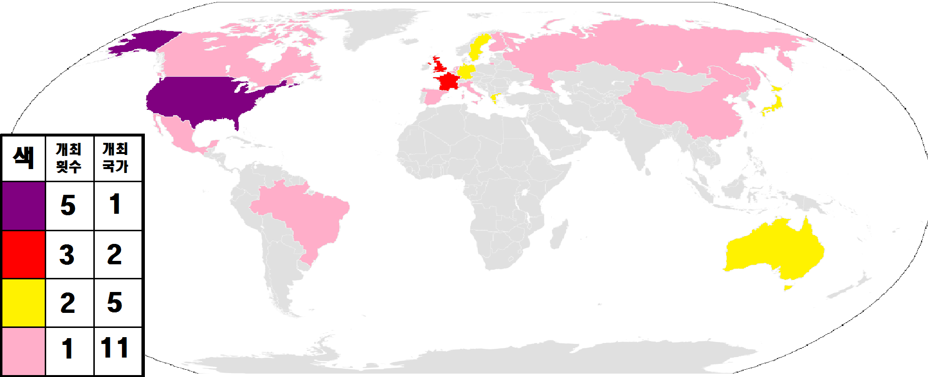 하계 올림픽 개최국